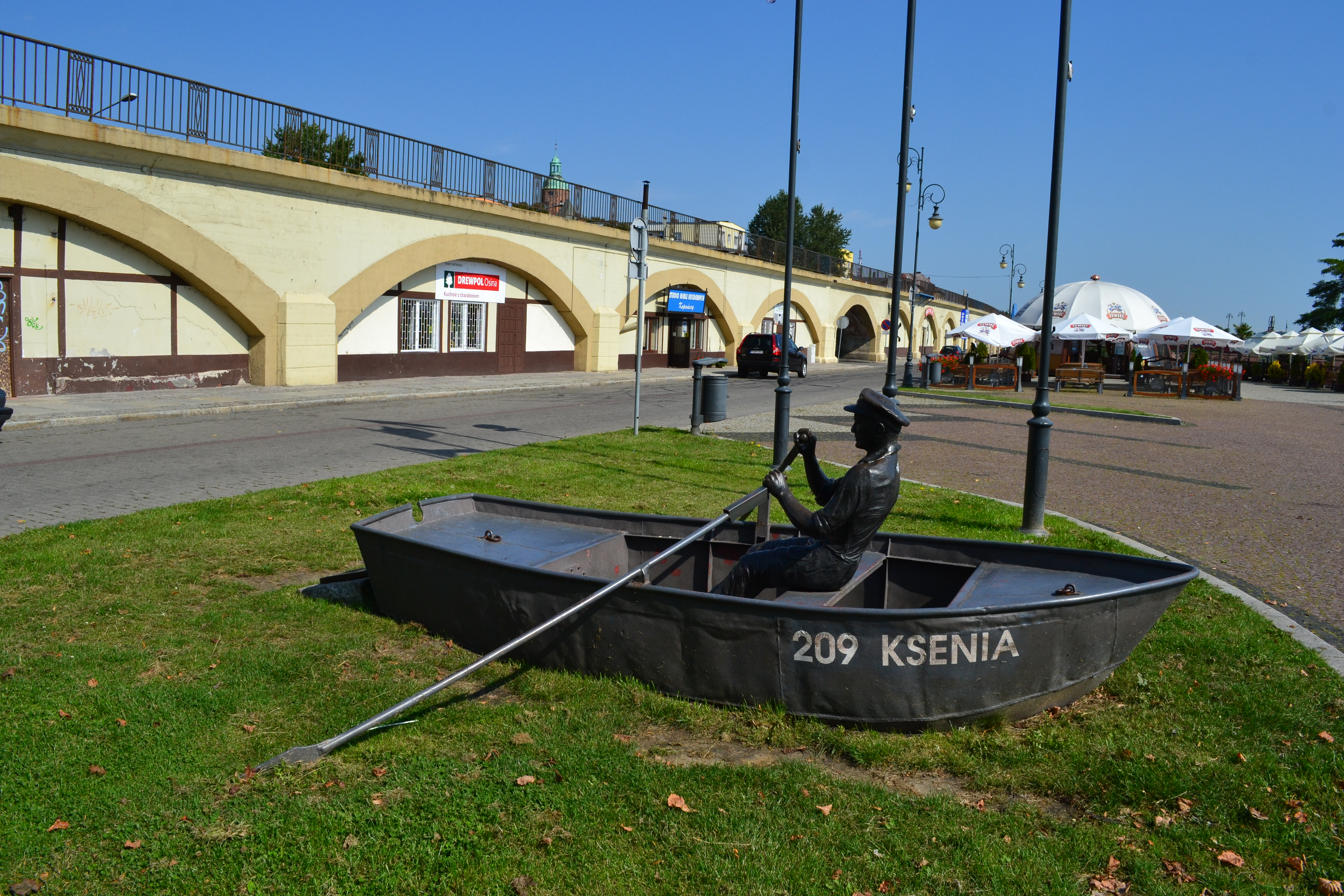 Pomnik Pawła Zacharka w Gorzowie Wlkp, który w latach 1945-65 przewoził ludzi przez Wartę